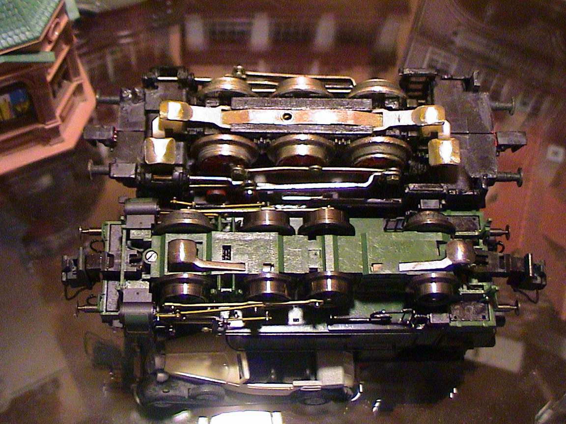 Schleifer zur Stromaufnahme bei älteren (oben, Außenschiene und Mitteleiter) und neueren (unten, nur vom Mittelleiter) Trix-Express-Loks